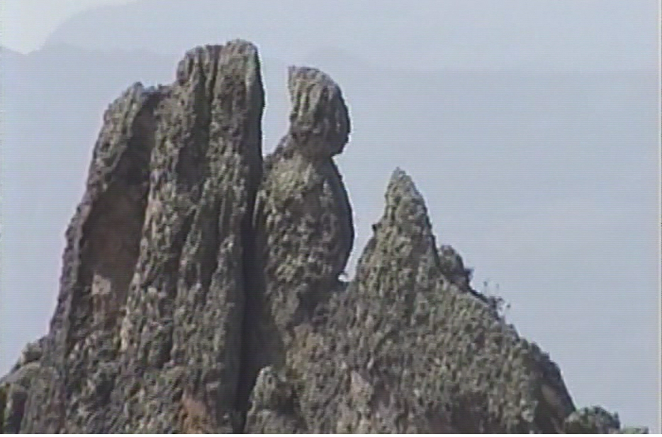 La Figura del Indio con su chuyo